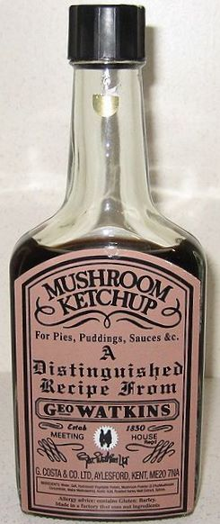 Une bouteille de ketchup au champignon.